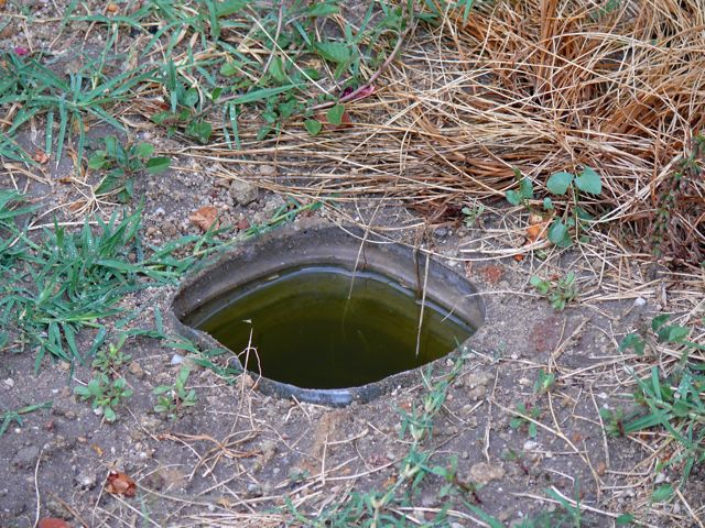 Sencilla trampa de agua usada en jardines y huertos para contener la plaga de topillos (Microtus arvalis) en Castilla y León, 2007